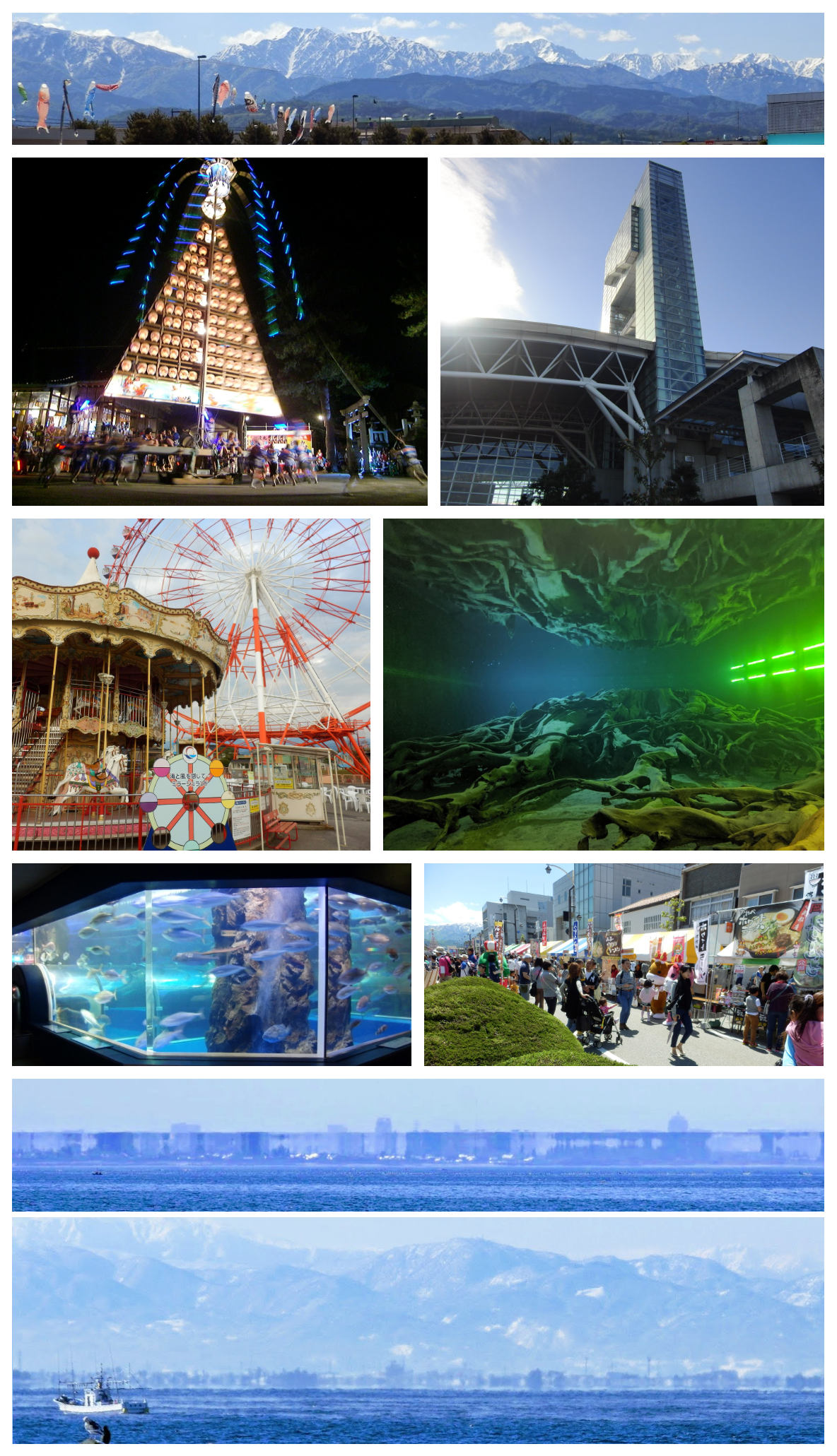 富山県魚津市の紹介